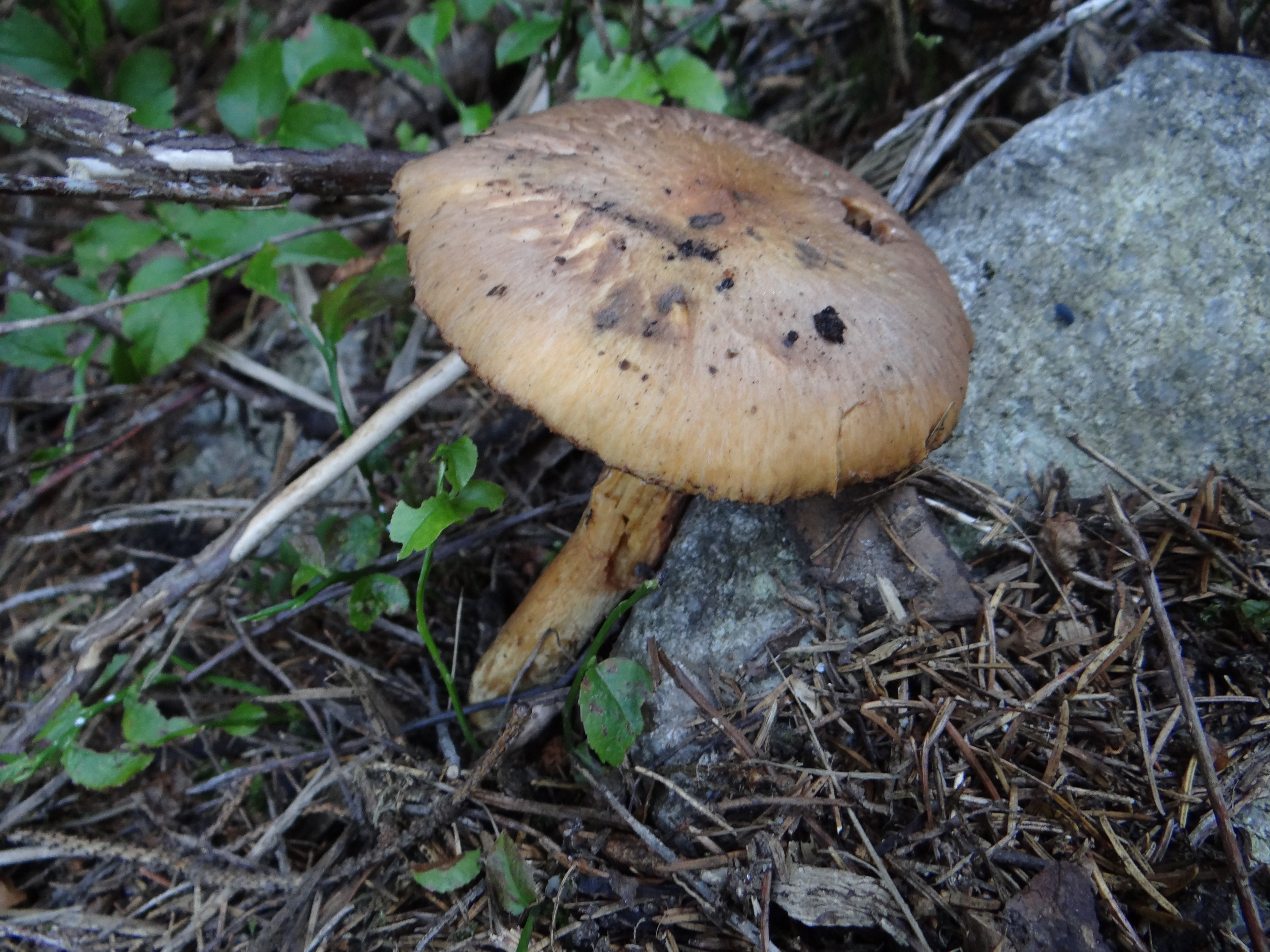 Chroogomphus helveticus (location: Slovakia, Nízke Tatry, Sedlo pod Skalkou)